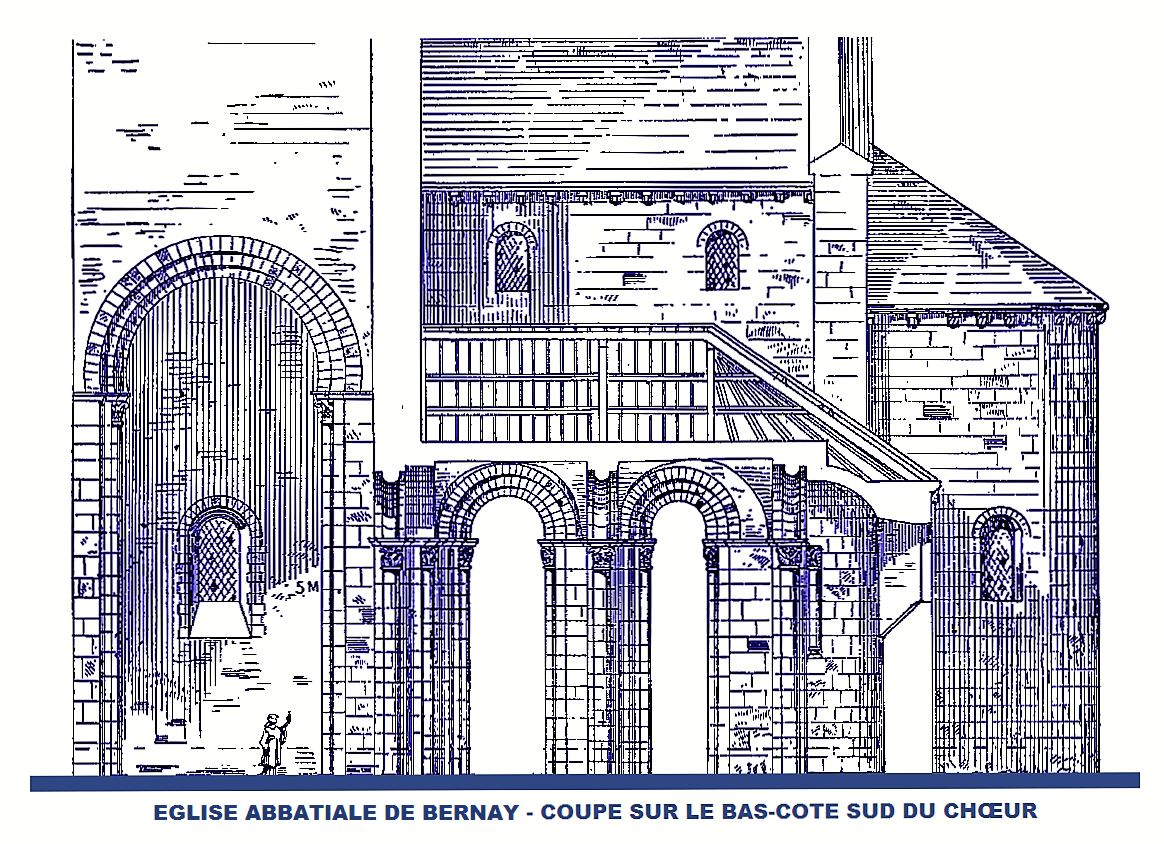 Abbaye de Bernay, coupe sur bas coté sud du choeur (image du domaine public modifiée, Congrès archéologique de Caen, 1909)